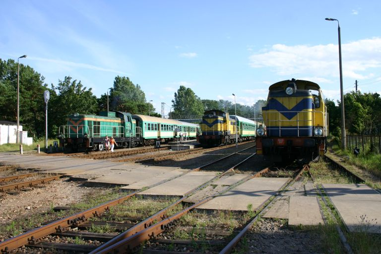 Bahnhof Hel